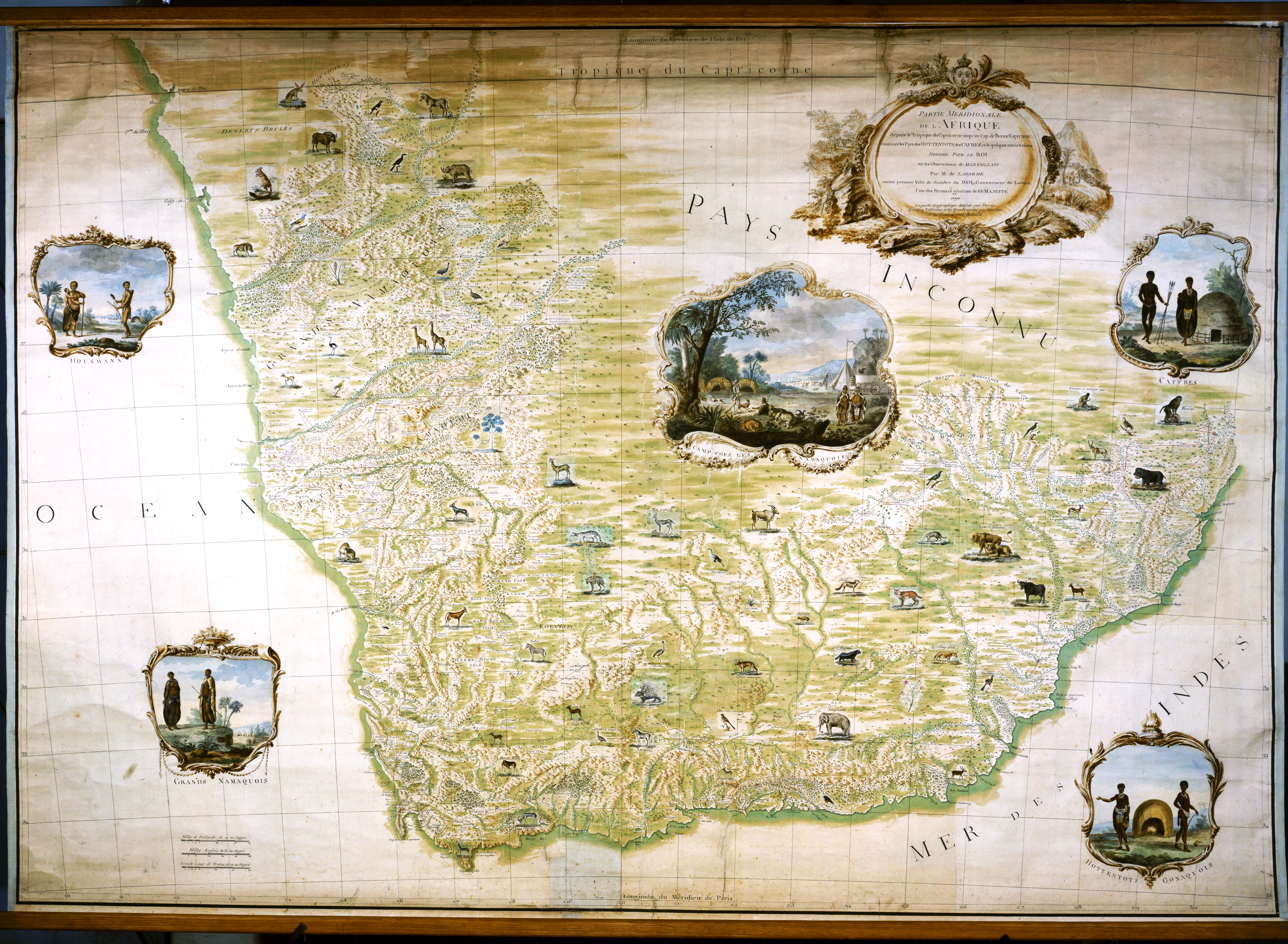 Partie Méridionale de l'Afrique depuis le Tropique du Capricorne jusqu'au Cap de Bonne Espérance contenant les Pays des Hottentots, des Cafres et de quelques autres Nations / dressée pour le Roi sur les observations de M. Le Vaillant par M. de Laborde, ancien premier valet de chambre du Roi, gouverneur du Louvre, l'un des Fermiers généraux de Sa Majesté